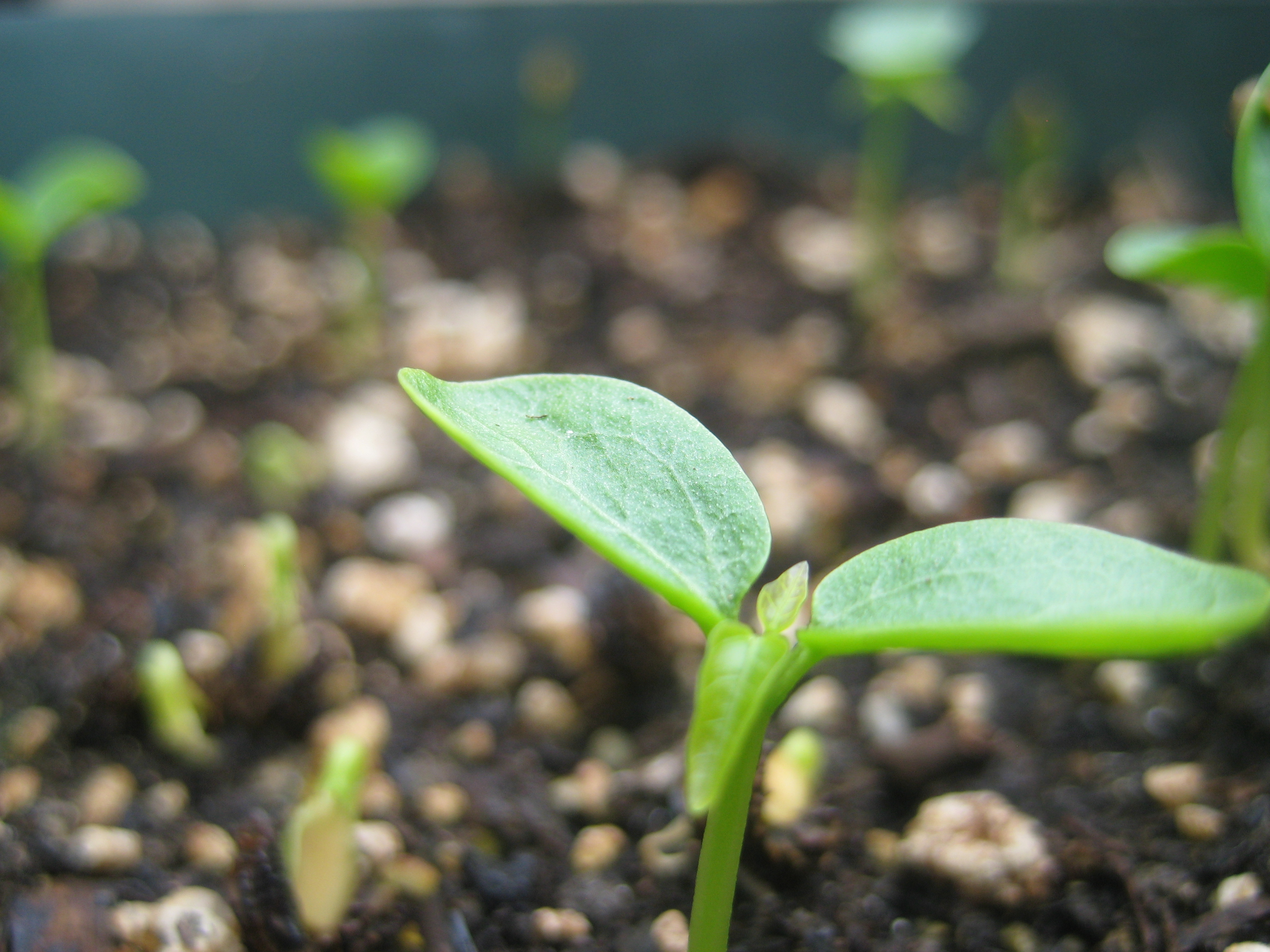 A papaya seedling (Carica papaya).